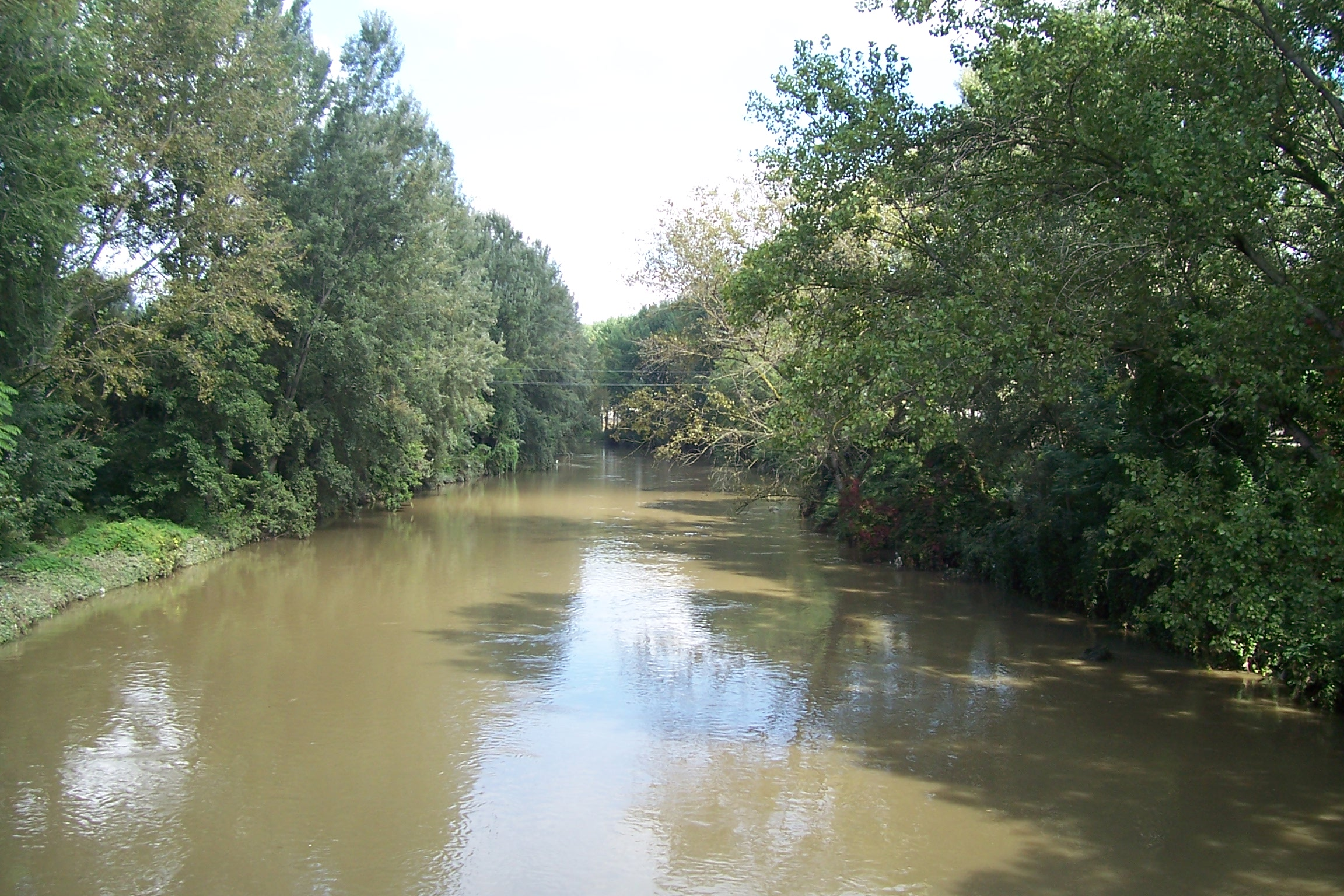 Il Lambro a Melegnano dal ponte sulla via Emilia